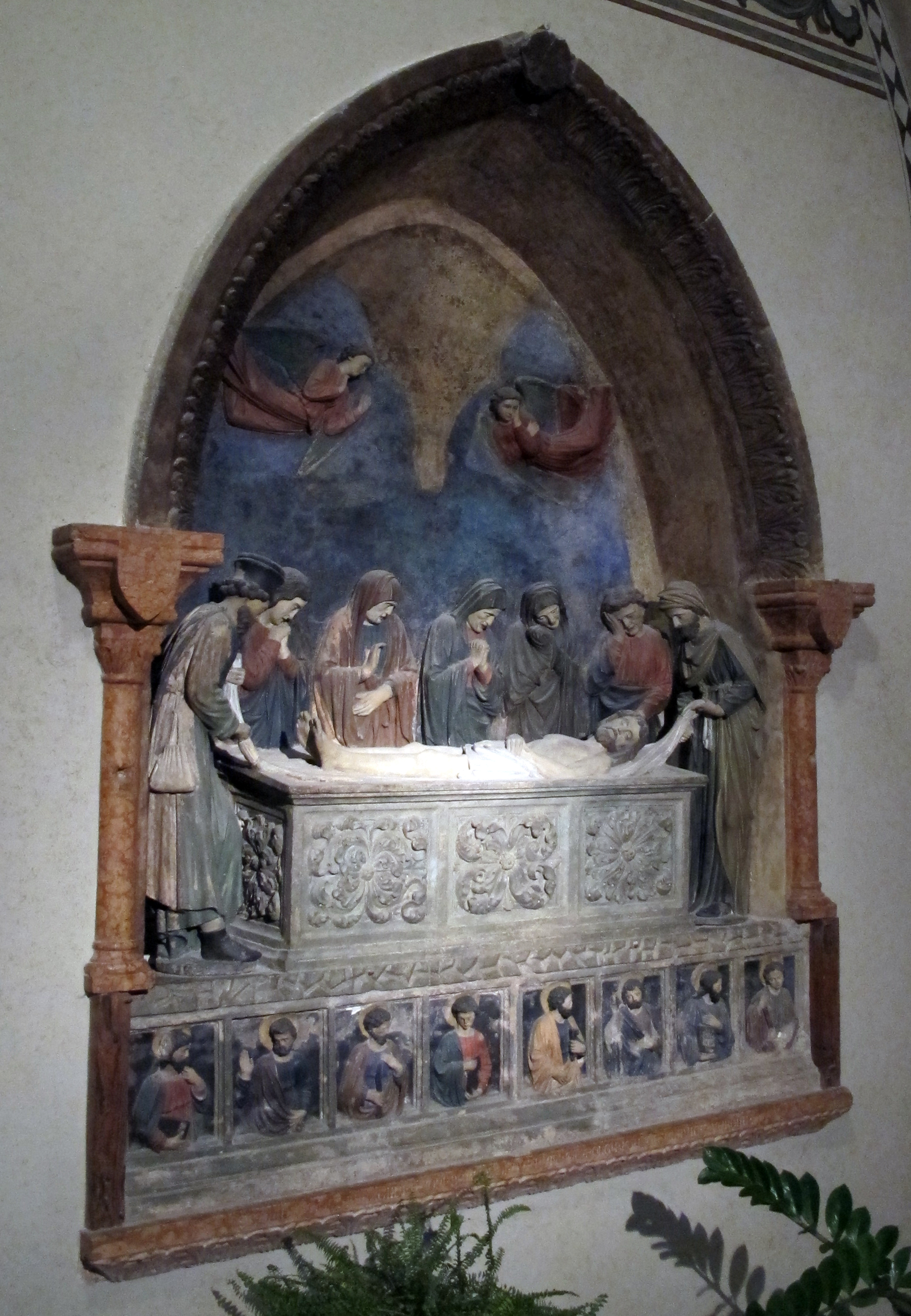 Santa Anastasia (Verona)